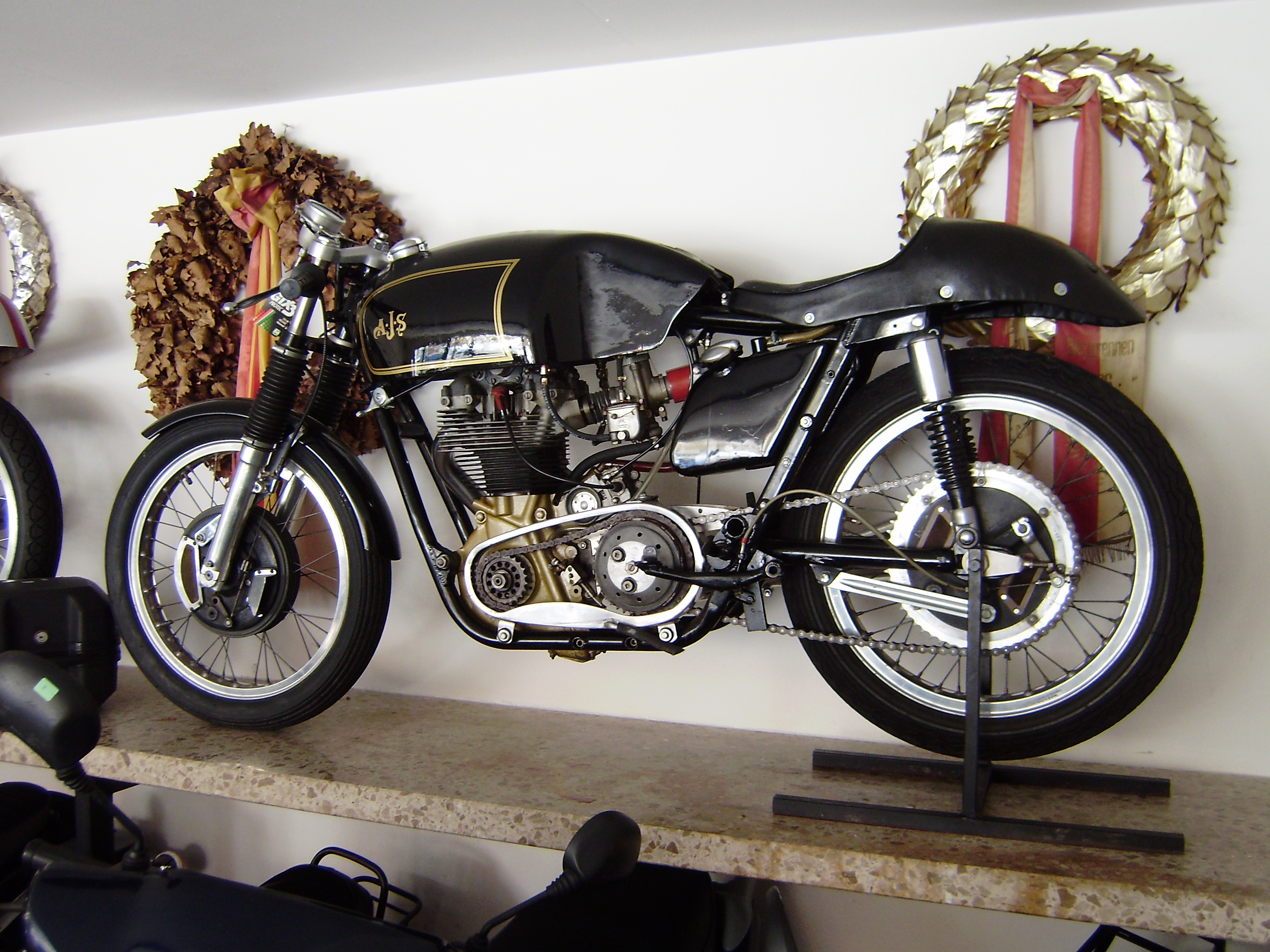 Toni Grubers Rennmotorrad AJS 7R 350 ccm aus dem Jahre 1962, ausgestellt im Rennsportmuseum des Autohauses Gruber in Weiler im Allgäu, Bayern, Deutschland